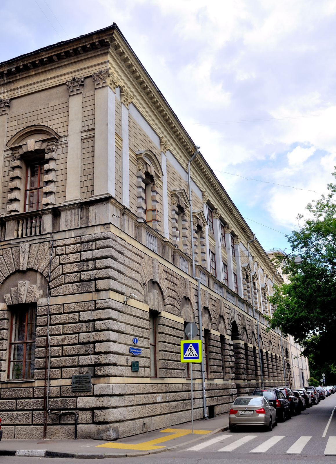 Институт Африки РАН